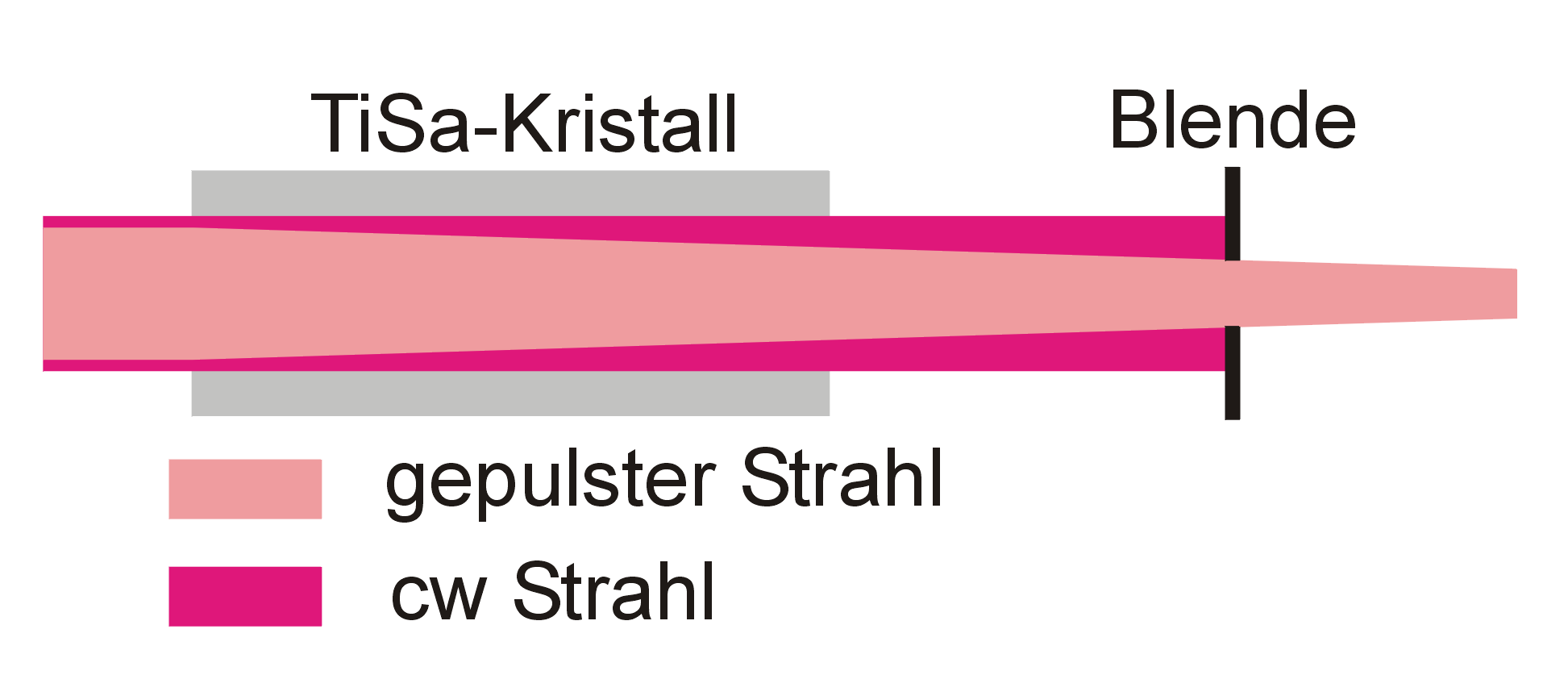 Titan:Saphir-Laser. Schema, wie cw-Strahl unterdrückt wird.